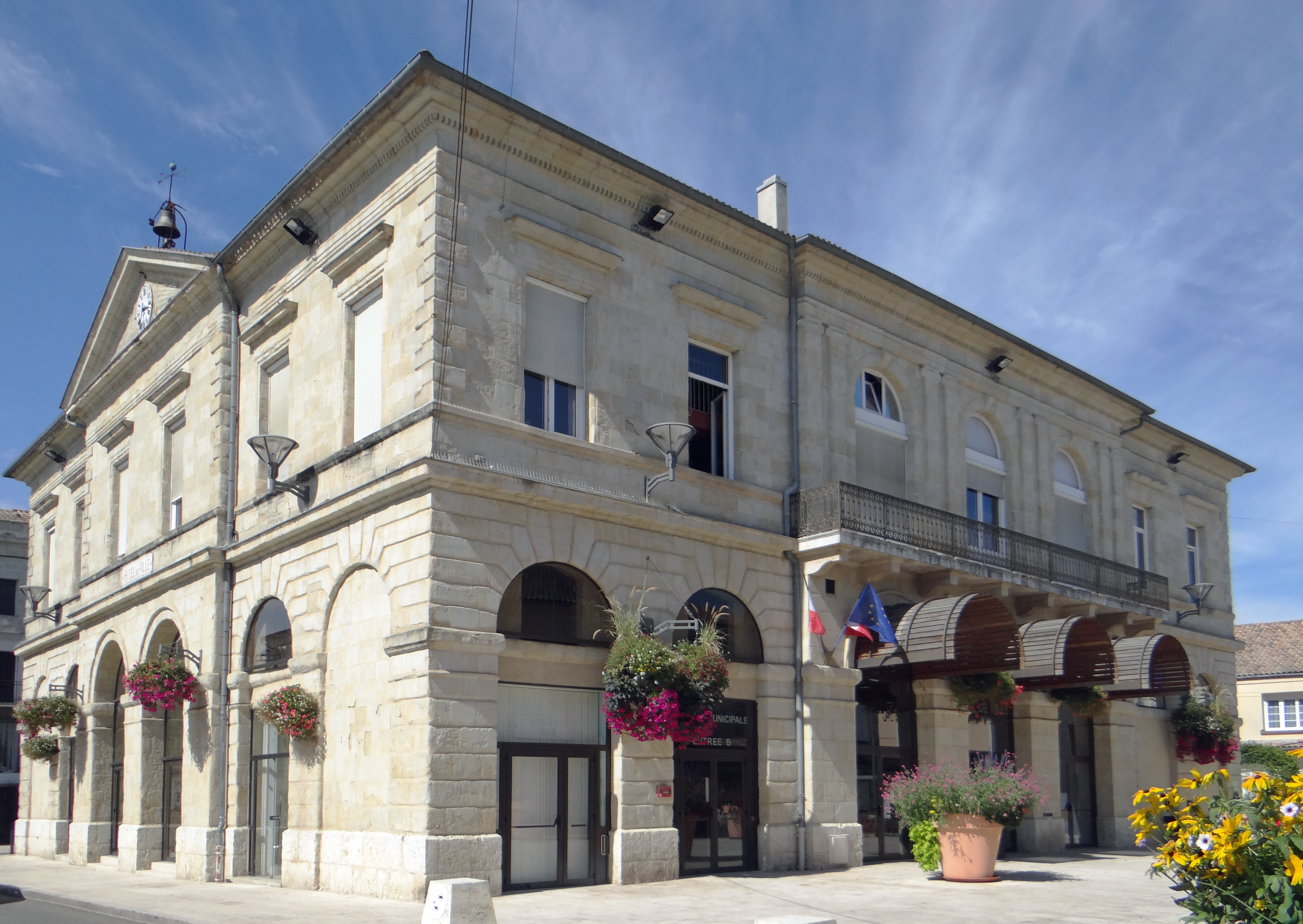 Miramont-de-Guyenne - Hôtel de ville